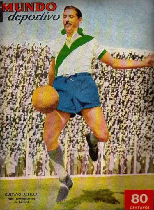 Gustavo Albella